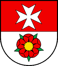 Wappen der früher selbständigen Gemeinde Montbrelloz Kanton Freiburg Schweiz